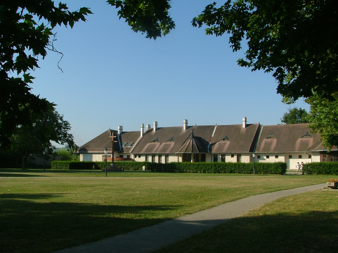 A faluház Nyúl településen